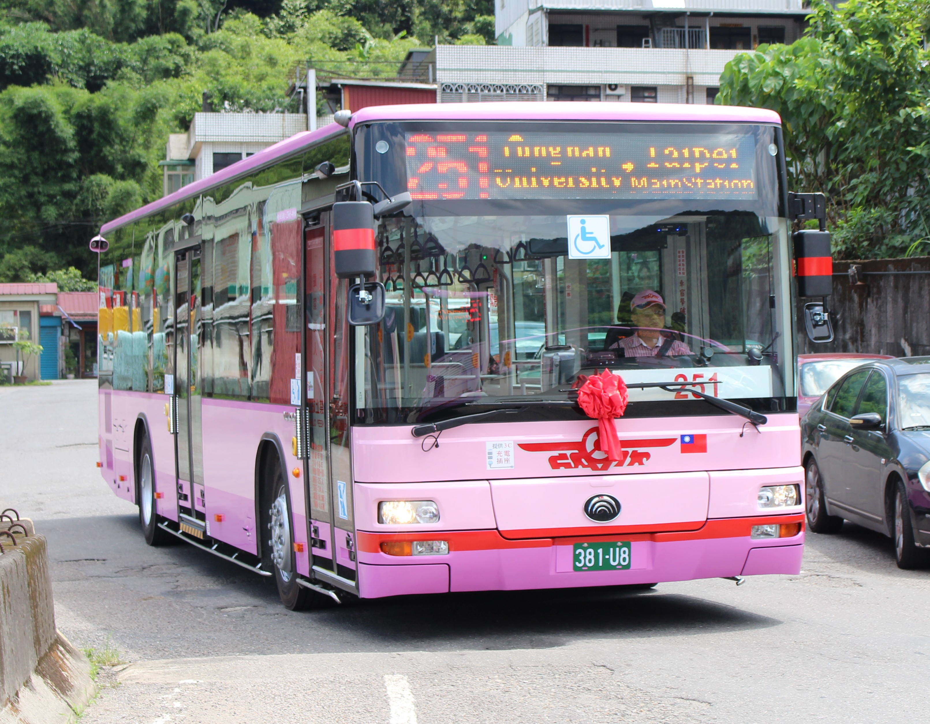 欣欣客運2016 YUTONG ZK6128HG 381-U8